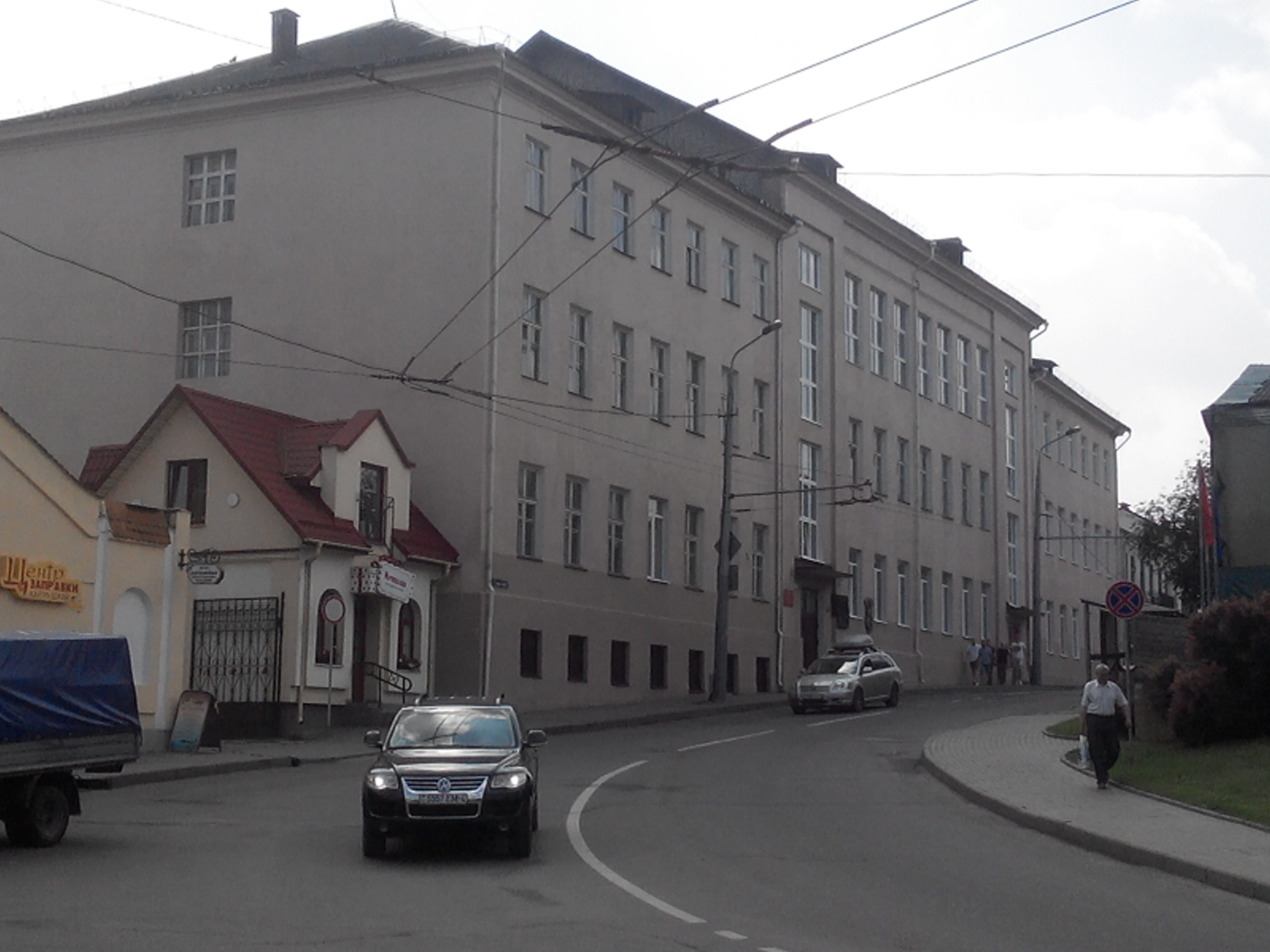 Будынак па вуліцы Вялікая Траецкая, 4 у Гродне